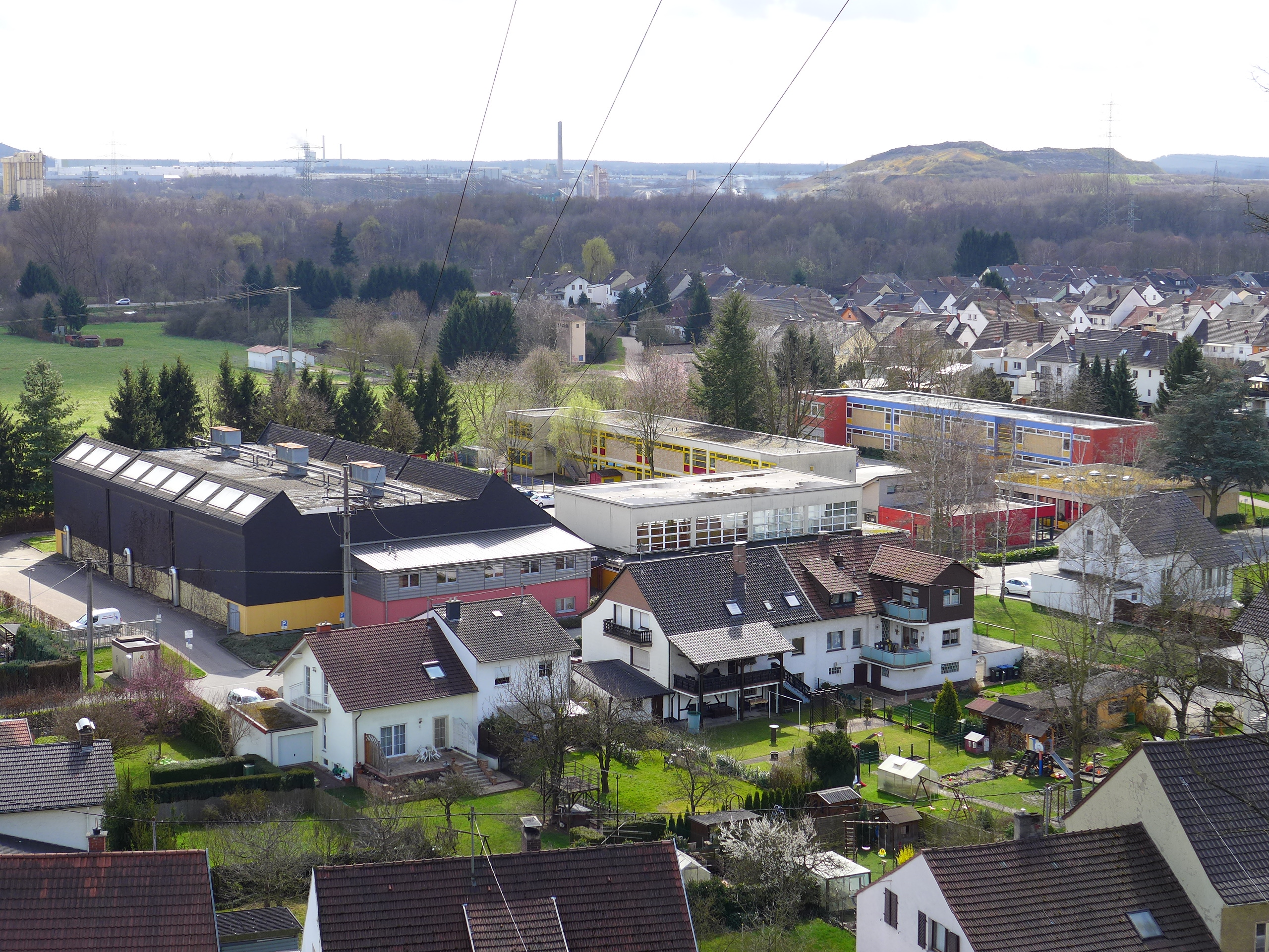 Diefflen, Blick von der Zipp auf die Grundschule mit den beiden Sporthallen